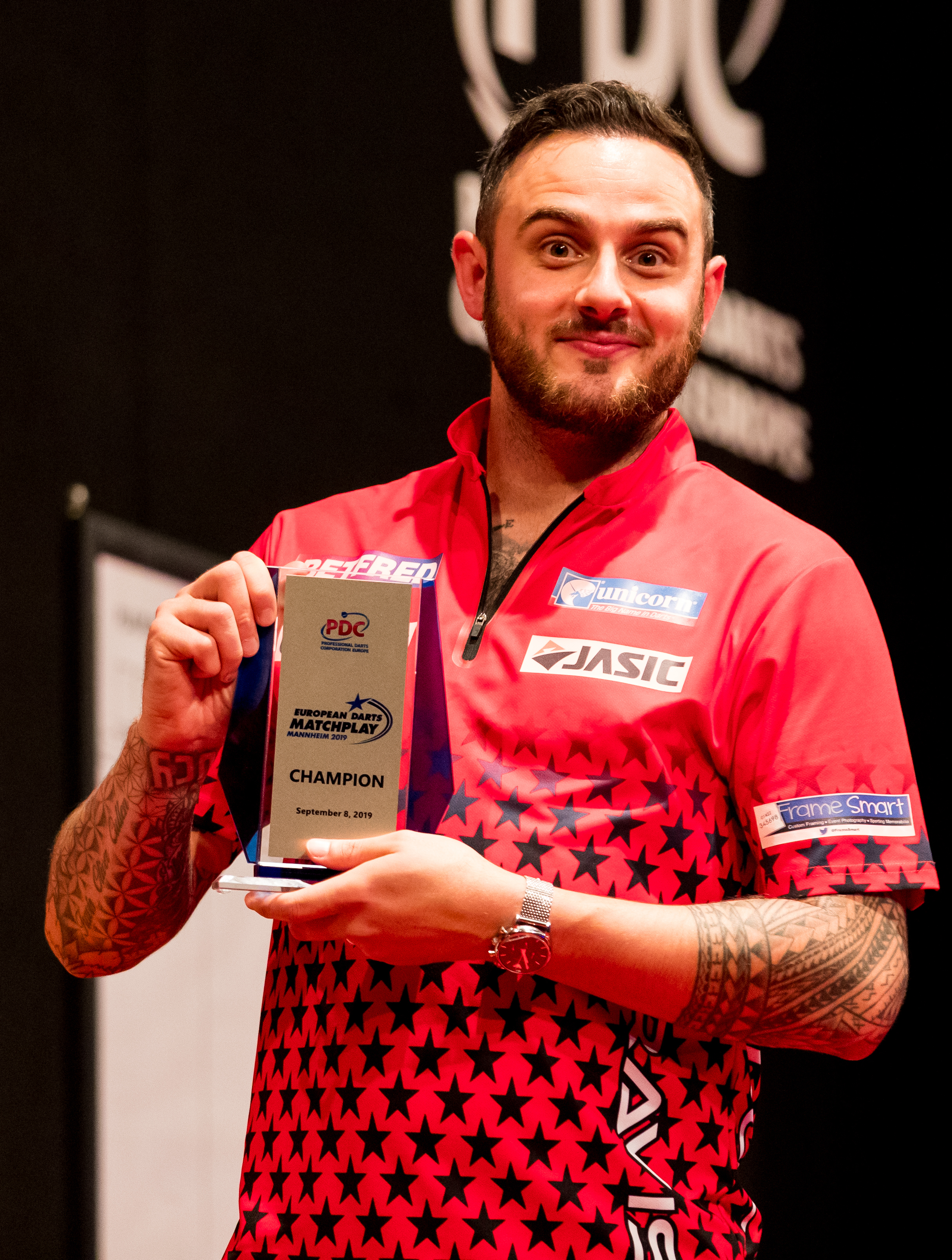 Michael van Gerwen 5:8 Joe Cullen during PDC Europe Darts Matchplay at Maimarkthalle, Mannheim, Baden-Württemberg, Germany on 2019-09-08, Photo: Sven Mandel